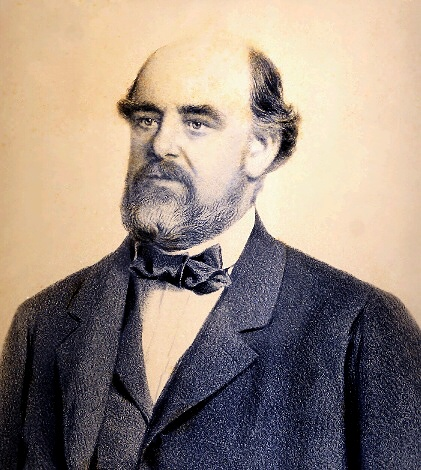 Alfred Skene, starosta Brna v letech 1864–1866